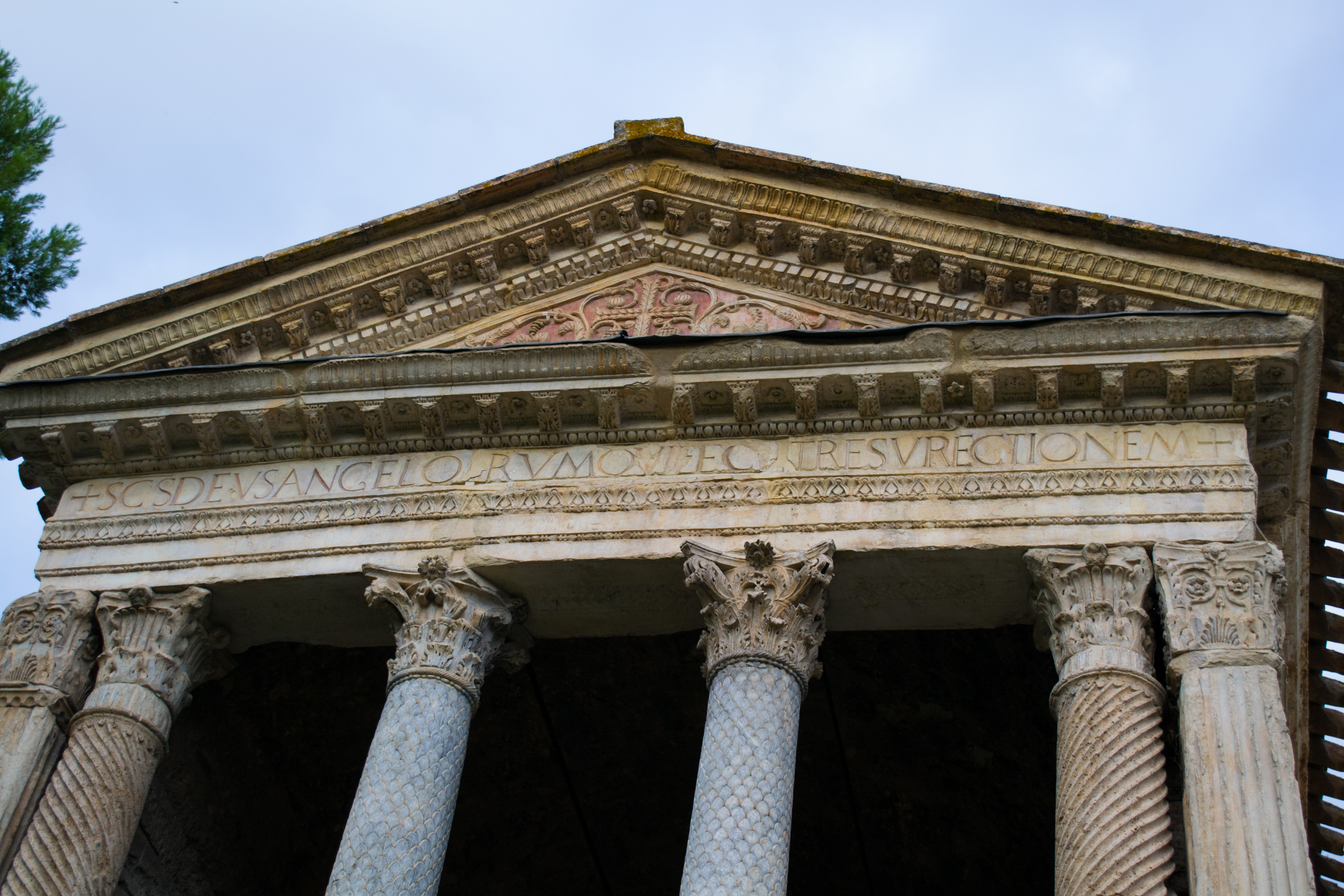 Tempietto del Clitunno - MIBAC This is a photo of a monument which is part of cultural heritage of Italy.